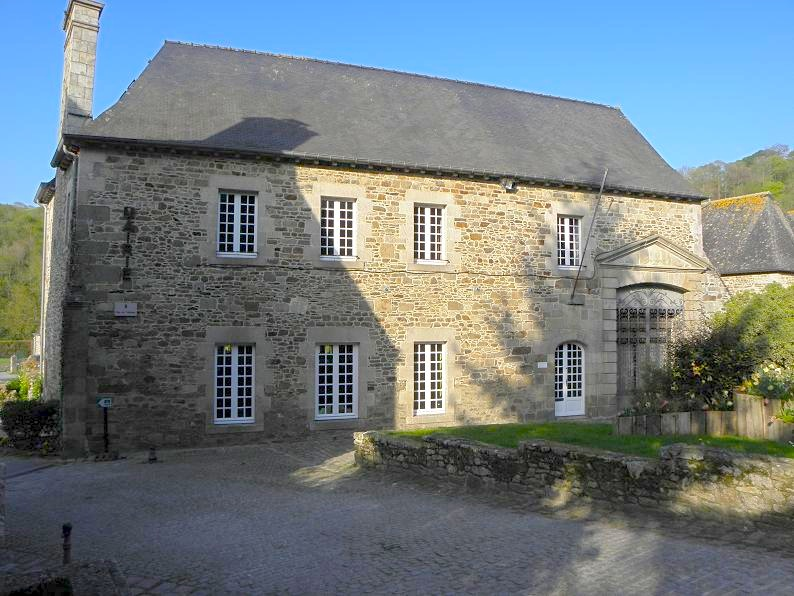 Mairie de Léhon (22).